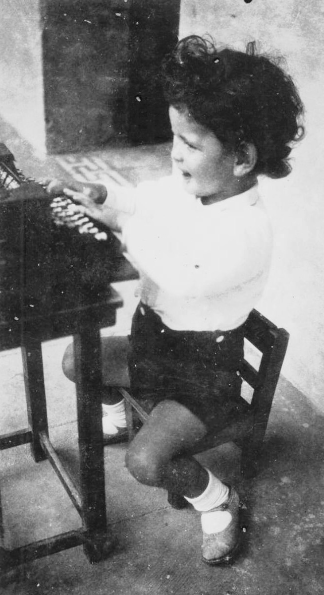 Efraín Recinos en su infancia.